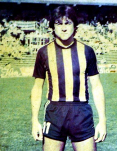 Walter René Fernández, futbolista de Rosario Central en 1980.